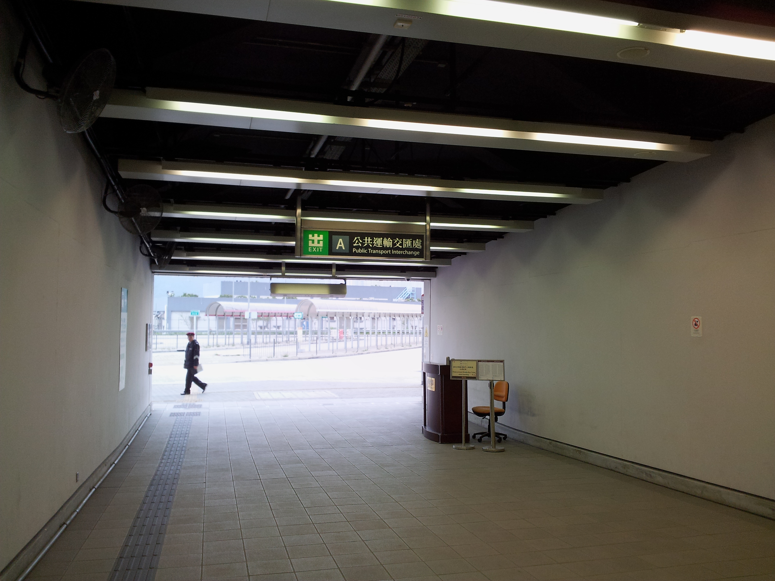 港鐵康城站通往公共運輸交匯處的出口